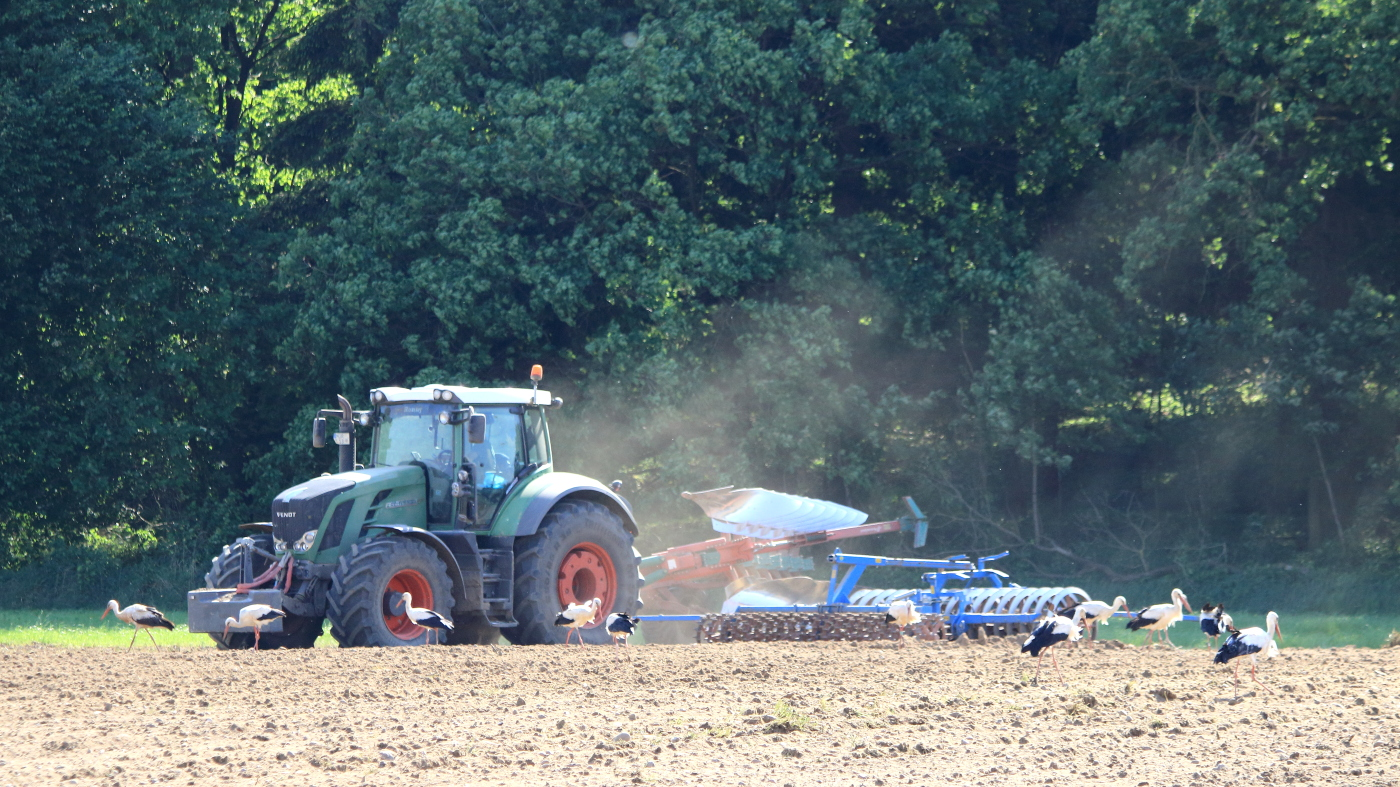 22 Weißstörche im Gefolge eines Pflugs bei Leizen